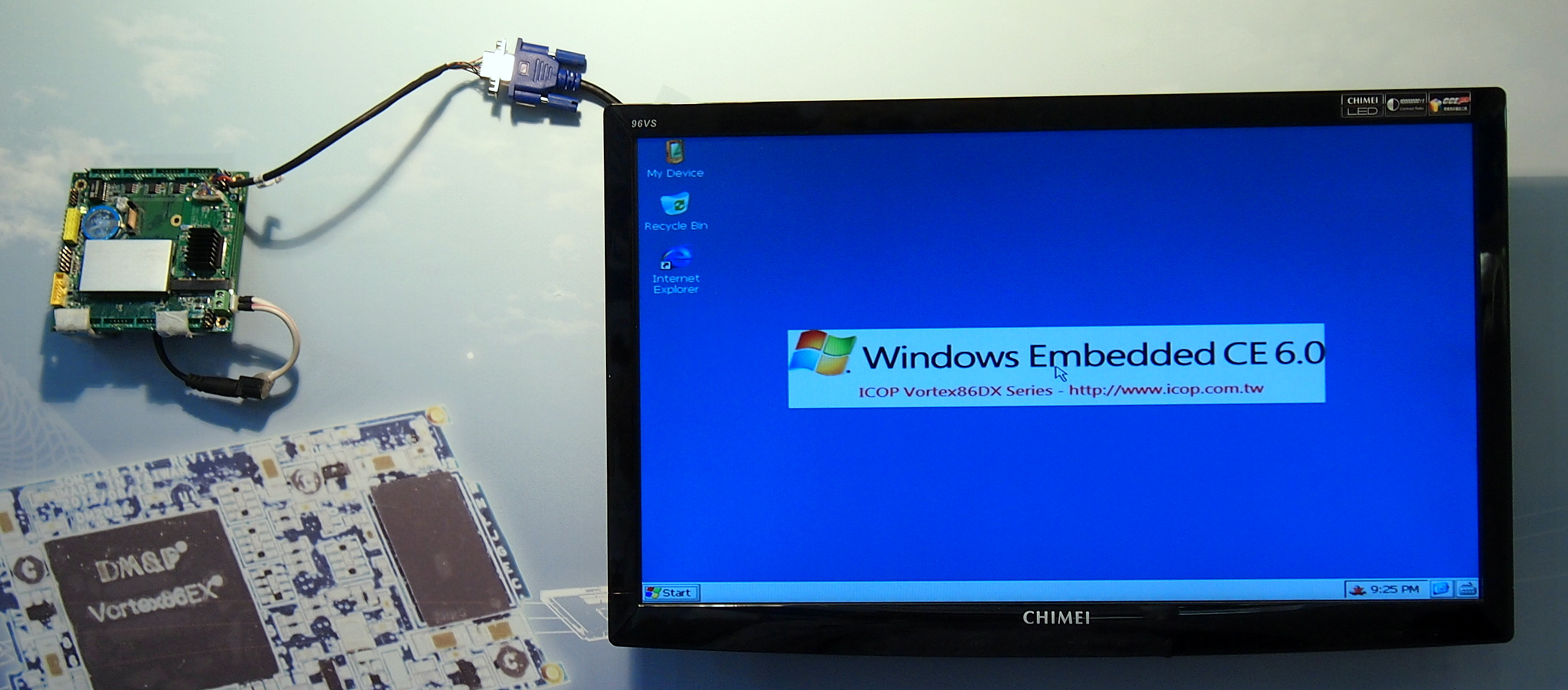 Embedded World 2014: Industrial PC-Board mit Windows Embedded CE 6.0